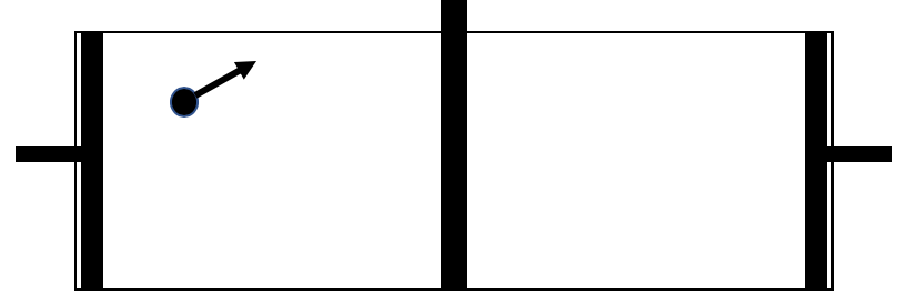 Illustration de l'expérience de Szilard